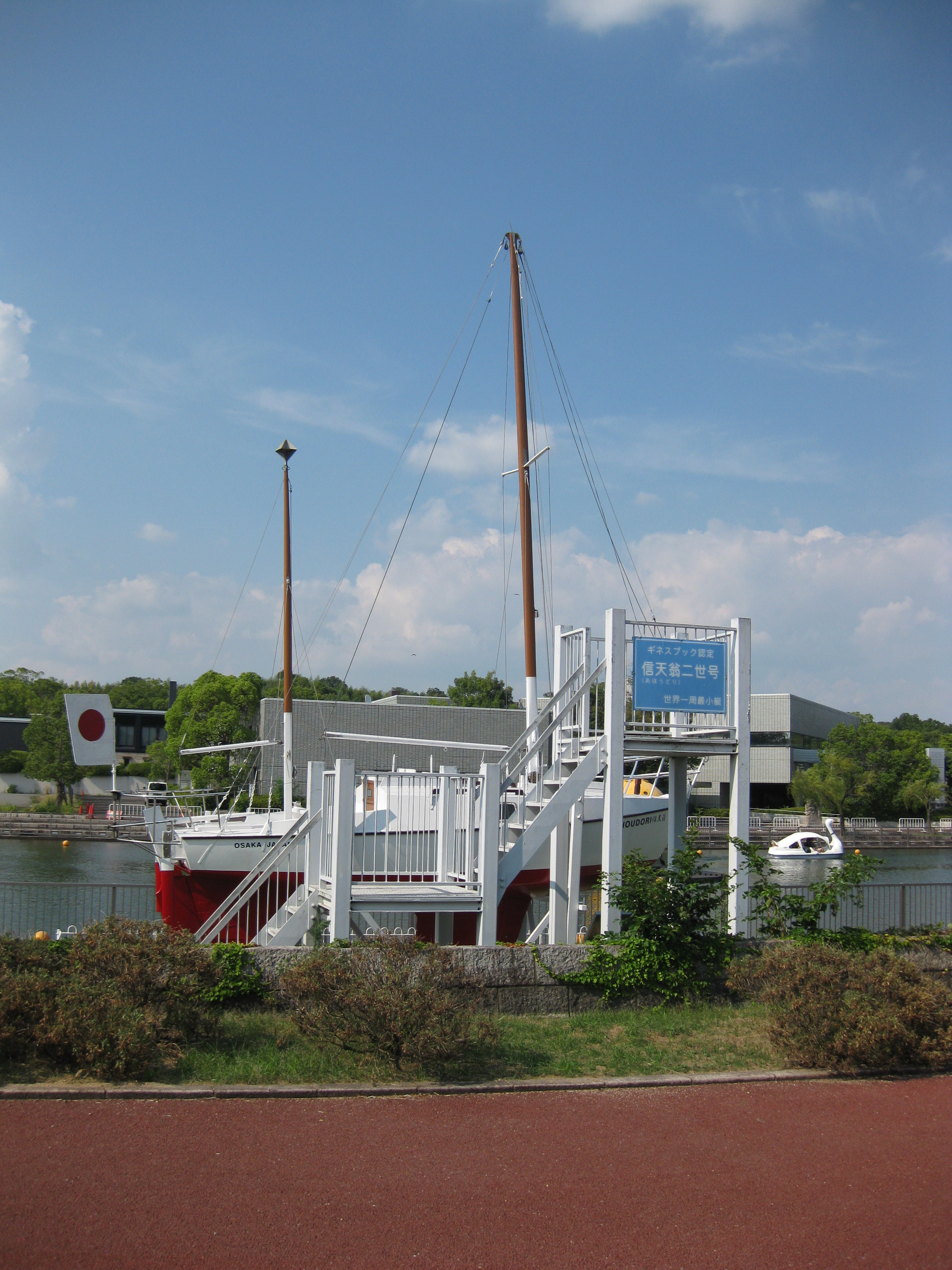 青木洋が世界一周航海に使用した自作ヨット、信天翁（あほうどり）二世号